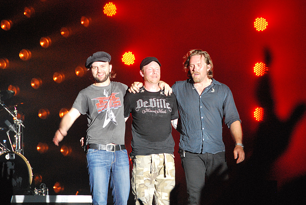 Medlemmerne af Dizzy Mizz Lizzy efter deres koncert på Vig Festival 2010.